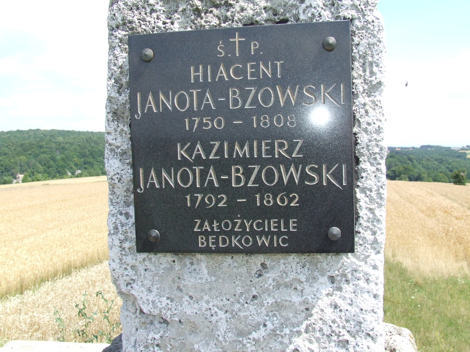 tablica z krzyża na Kopcu Bzowskich